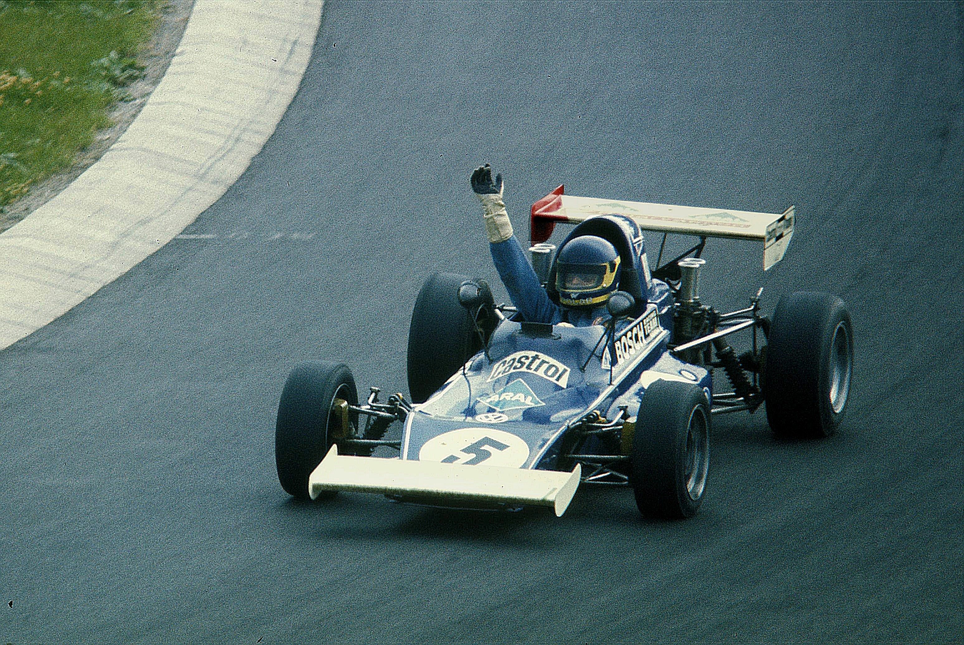 Kennerth Persson, Jahrgang 1943, im Kaimann Formel Super V auf dem Nürburgring